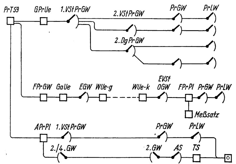 Schemazeichnung Wählprüfnetz Deutsche Bundespost